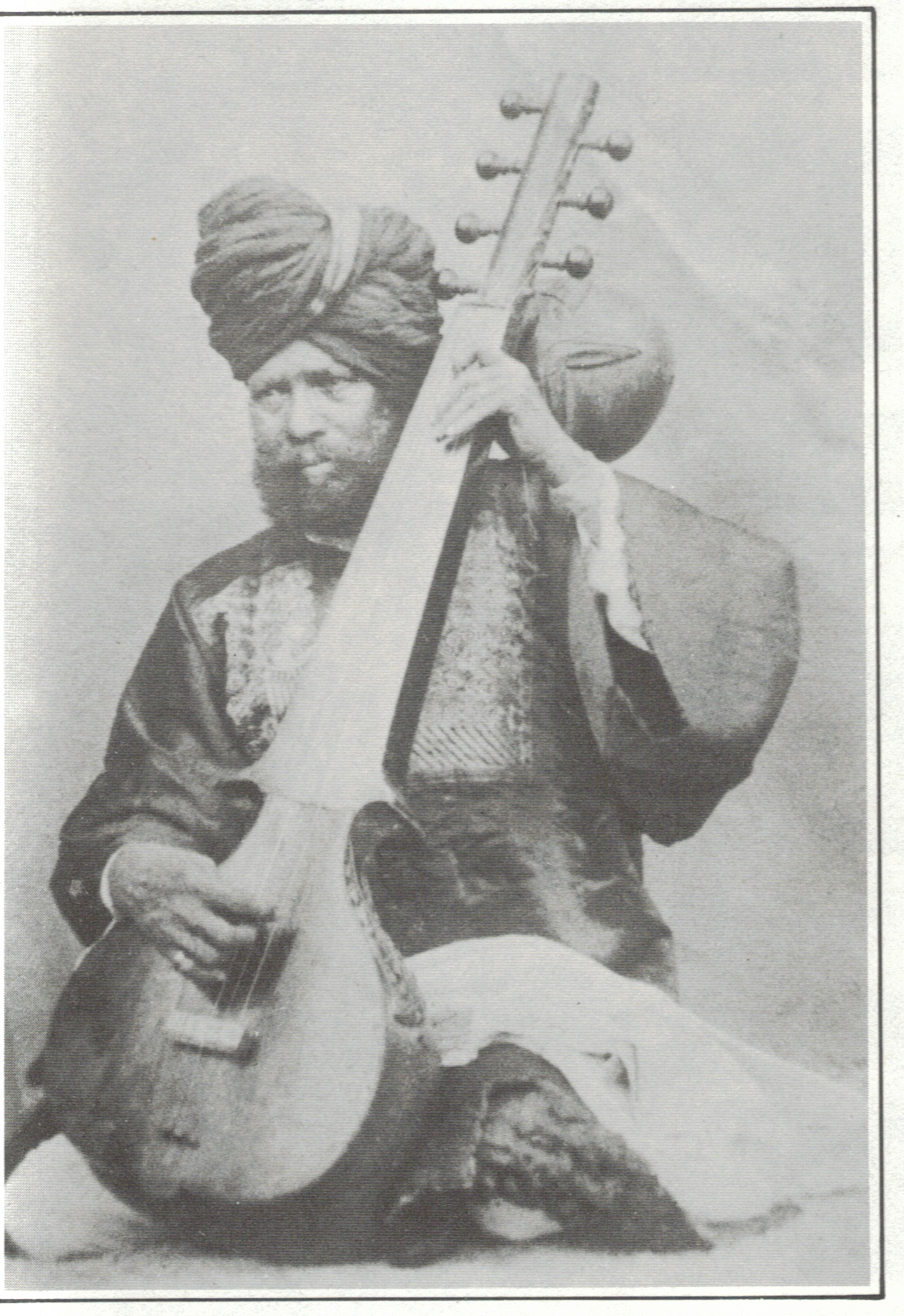 Rahmat Khan met sursingar. Datum onbekend. Fotograaf onbekend